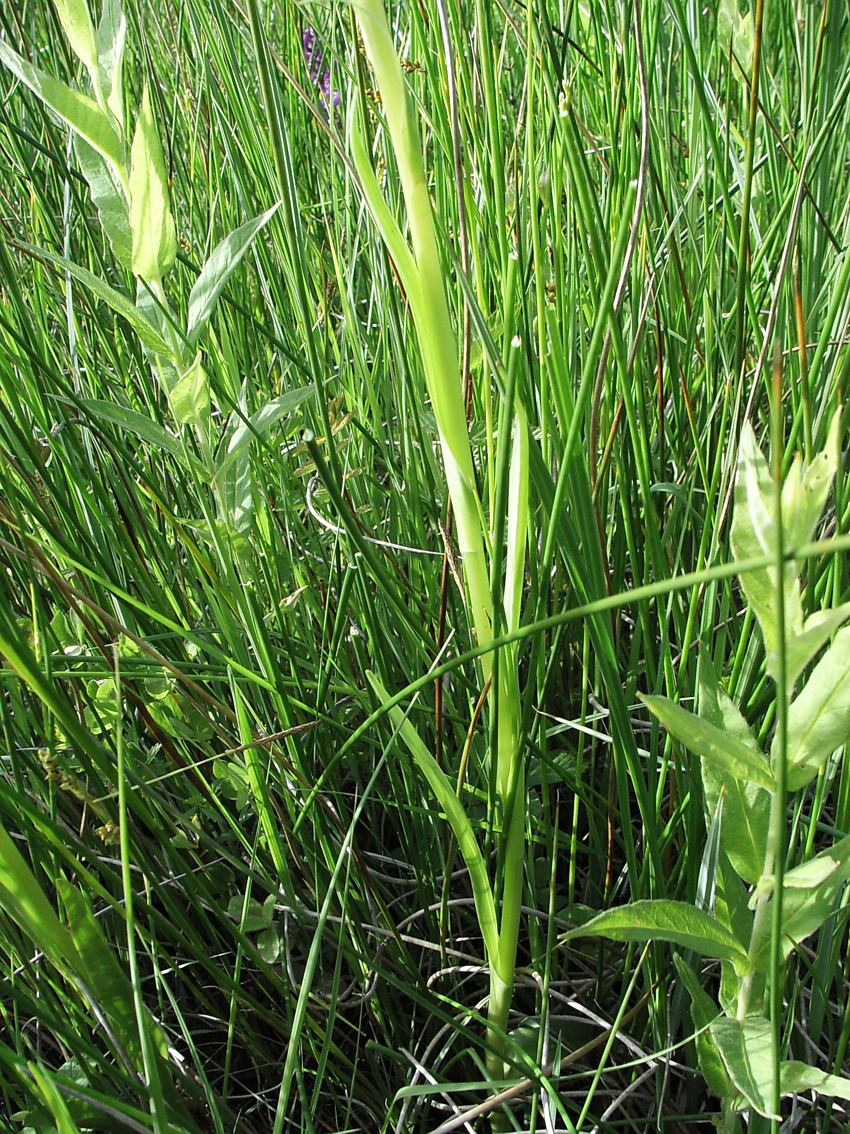 Dactylorhiza elata, Bardenat, Dordogne (France)